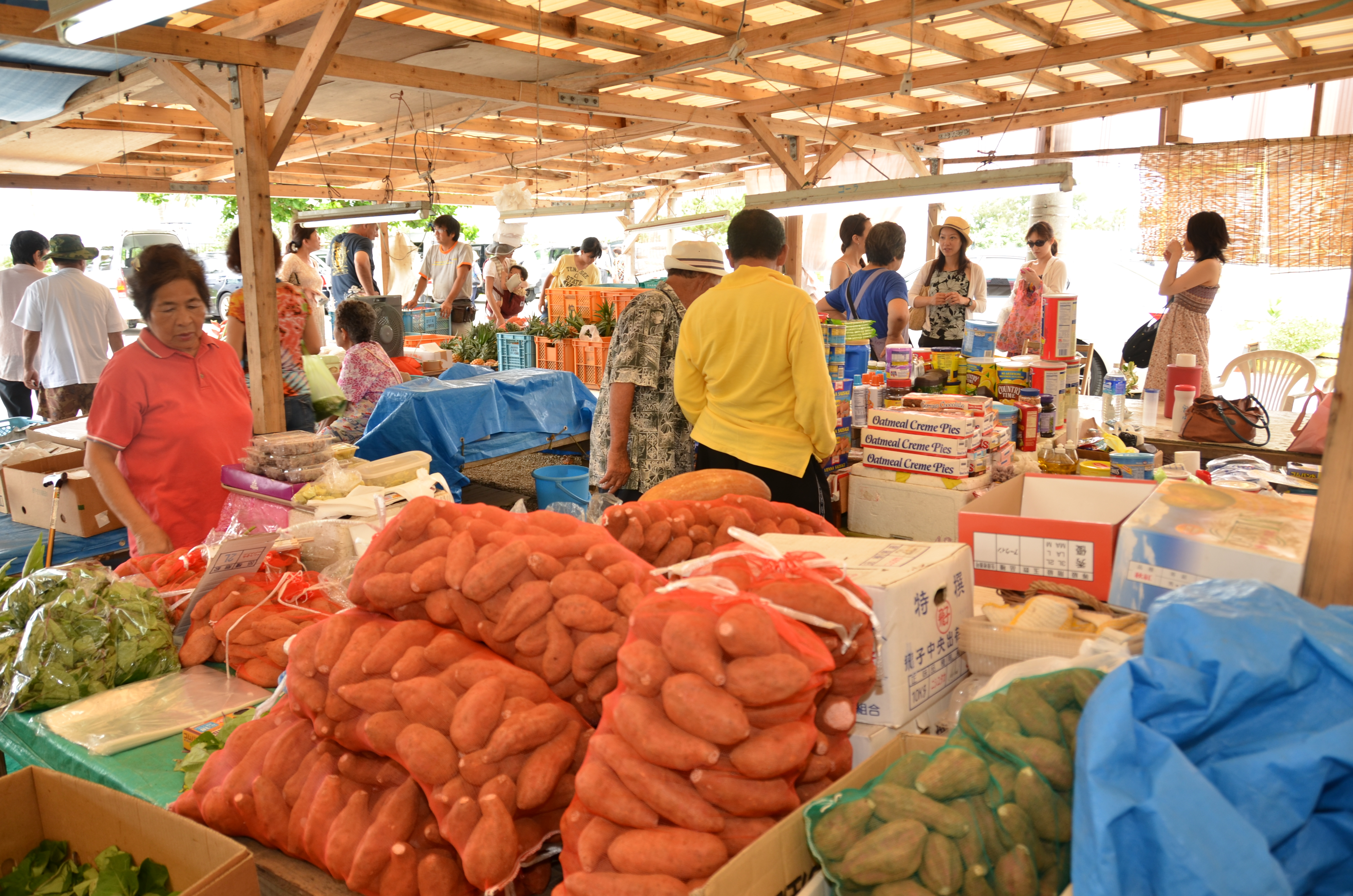 沖縄県金武町にある「いしじゃ自由市場」。金武町産の米や野菜から輸入菓子、衣類、古銭など取り扱う商品は幅広い。観光客も多く訪れる。